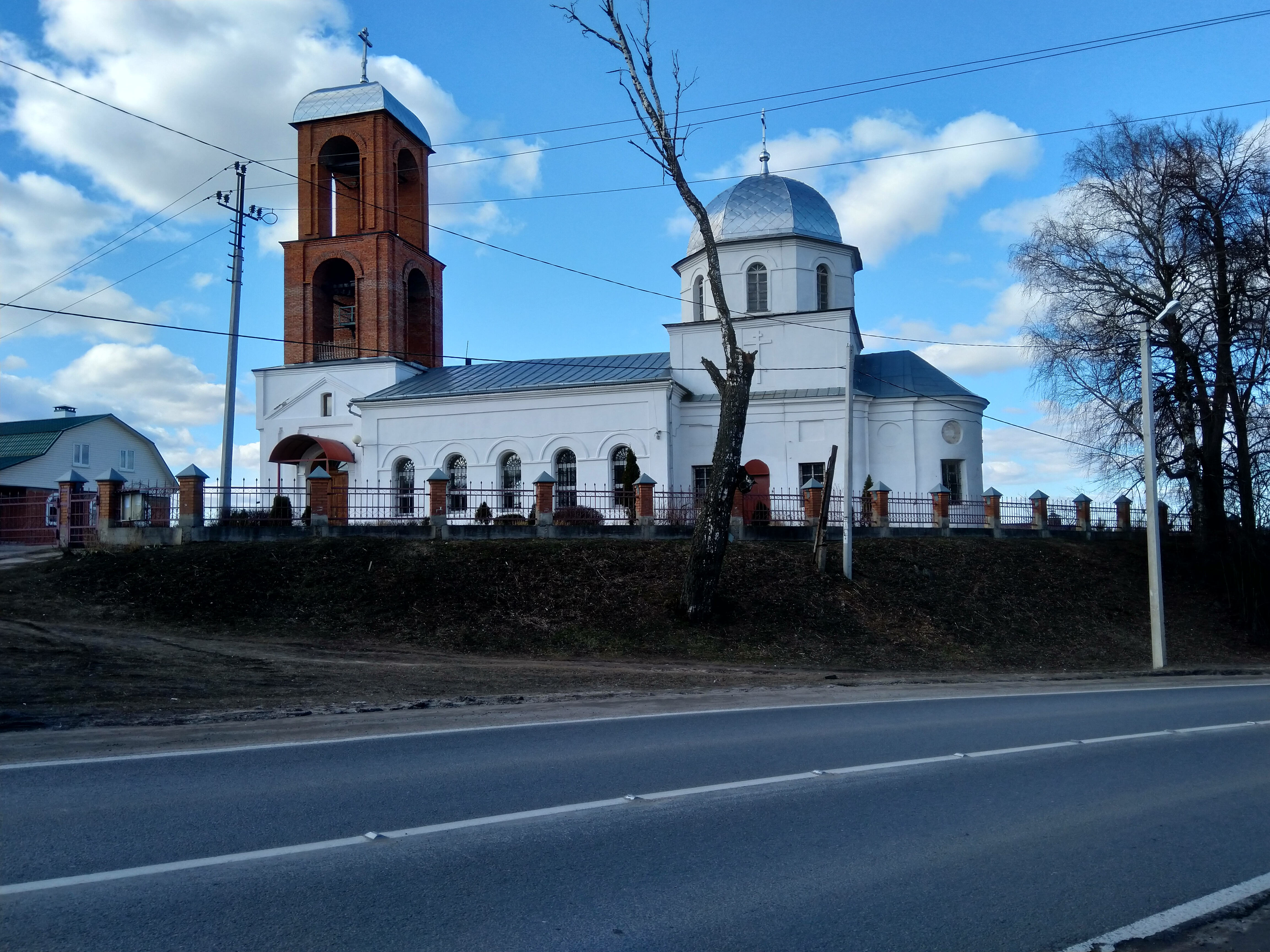 Покровская церковь села Сватково